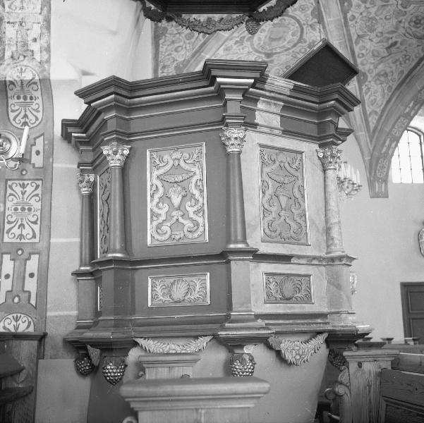 Predikstol gjord av Hans Örn. Donerad på 1730-talet av Conrad Ribbing och hans maka Ebba Charlotta Douglas. Före restaureringen. Kategori: (02) PredikstolarPredikstol gjord av Hans Örn. Donerad på 1730-talet av Conrad Ribbing och hans maka Ebba Charlotta Douglas. Före restaureringen.